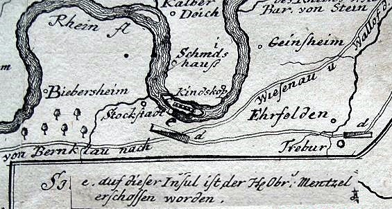 Geographische Vorstellung des Rhein-Stroms, Verlag: Christ. Riegel Buch- u. Kunst-Händler, Nürnberg, 1744. Die damalige Halbinsel Kühkopf in der Rheinschleife gegenüber Stockstadt ist als Kindskopf beschriftet.